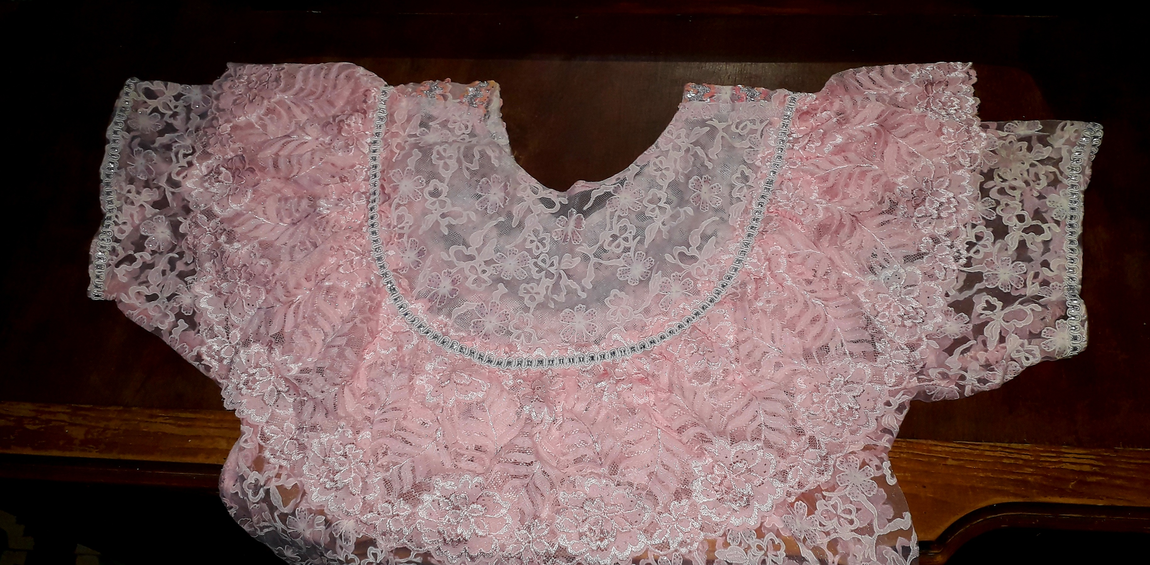 بنوار سطايفي او ما يعرف ب شرب زدف لإمرأة من سطيف يعود تاريخه إلى 1985